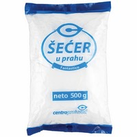 Šećer u prahu